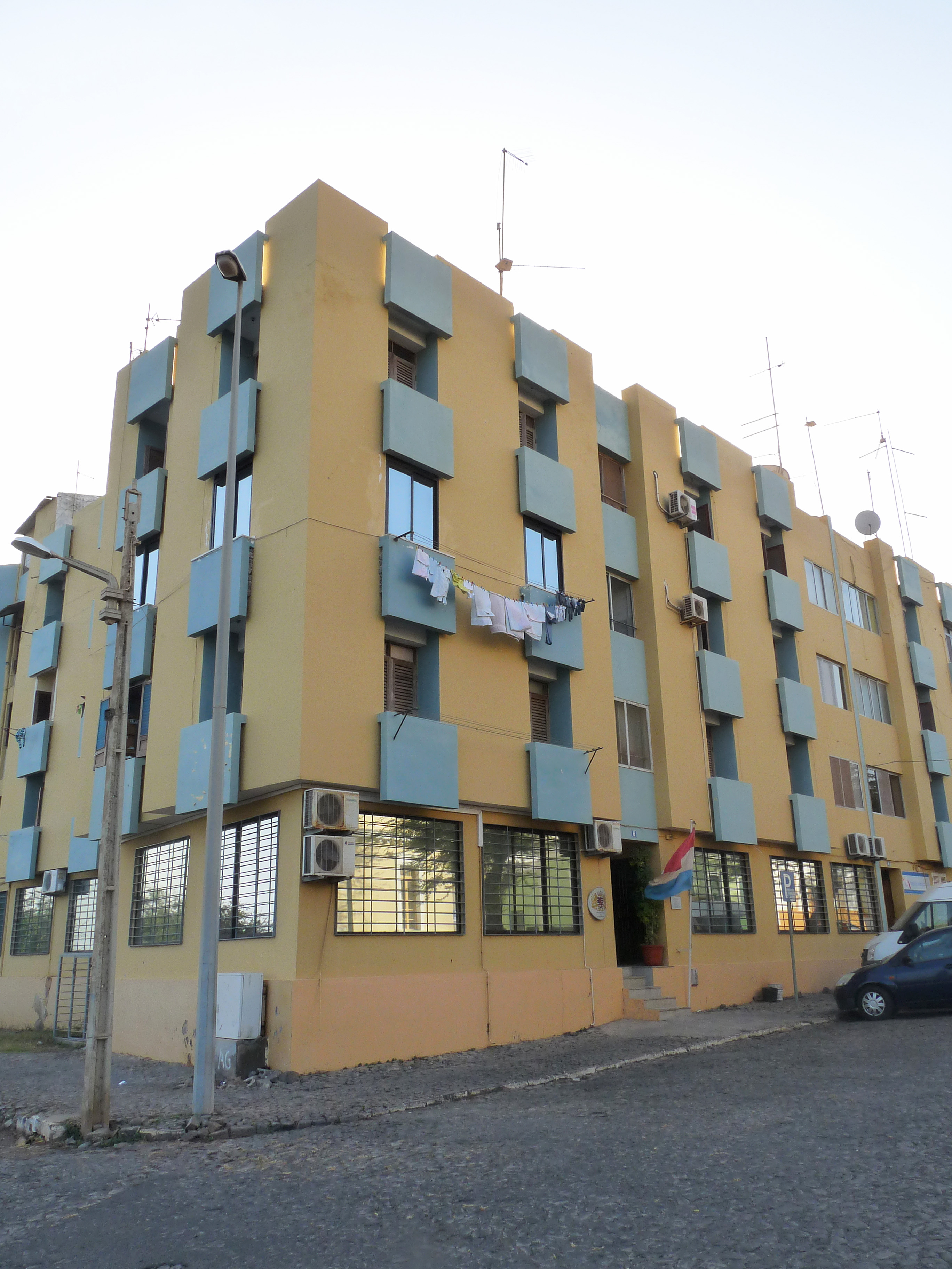 Praia (Cap-Vert) : Ambassade du Luxembourg